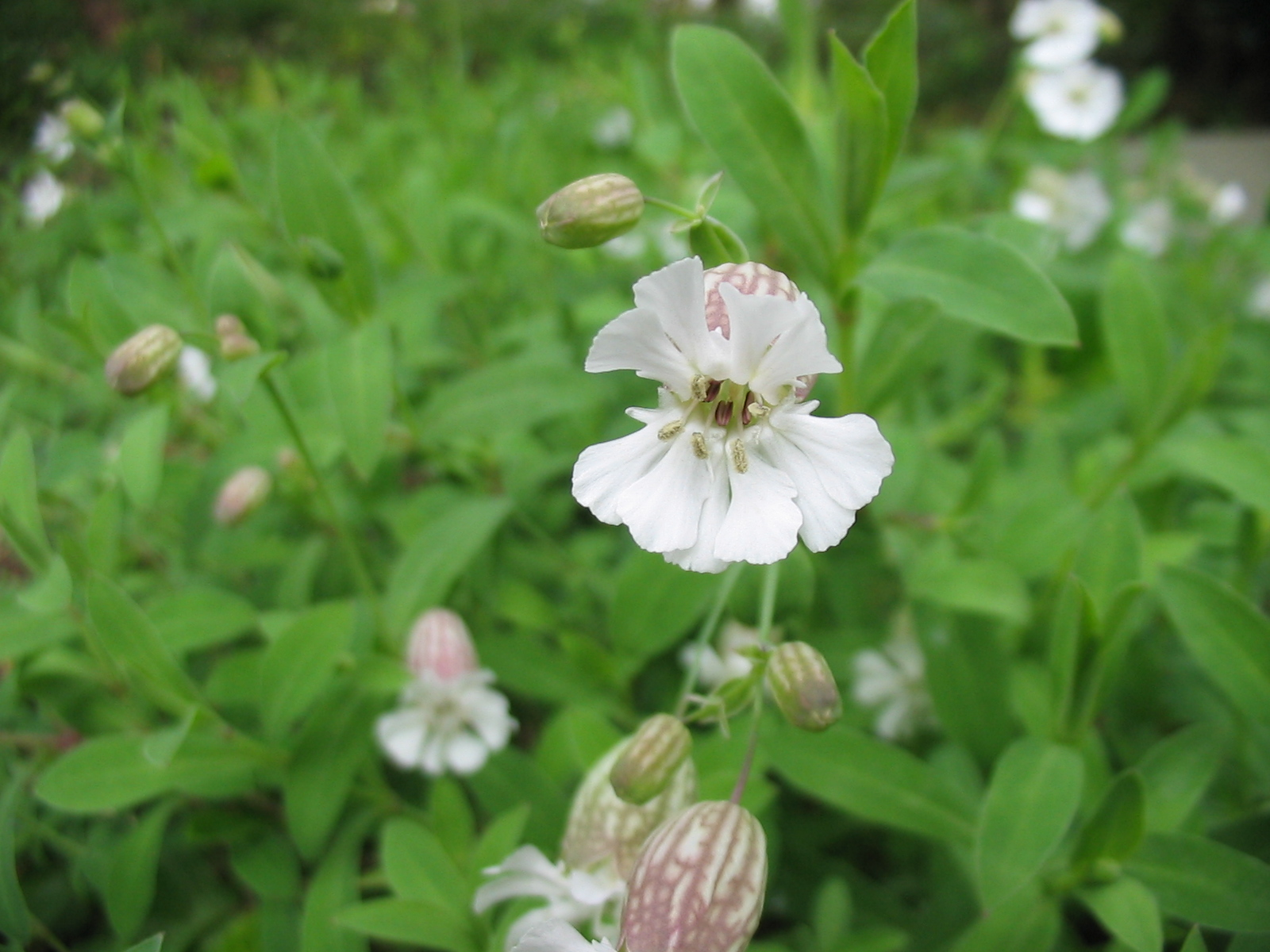 Einblütiges Leimkraut (Silene uniflora) - Flower